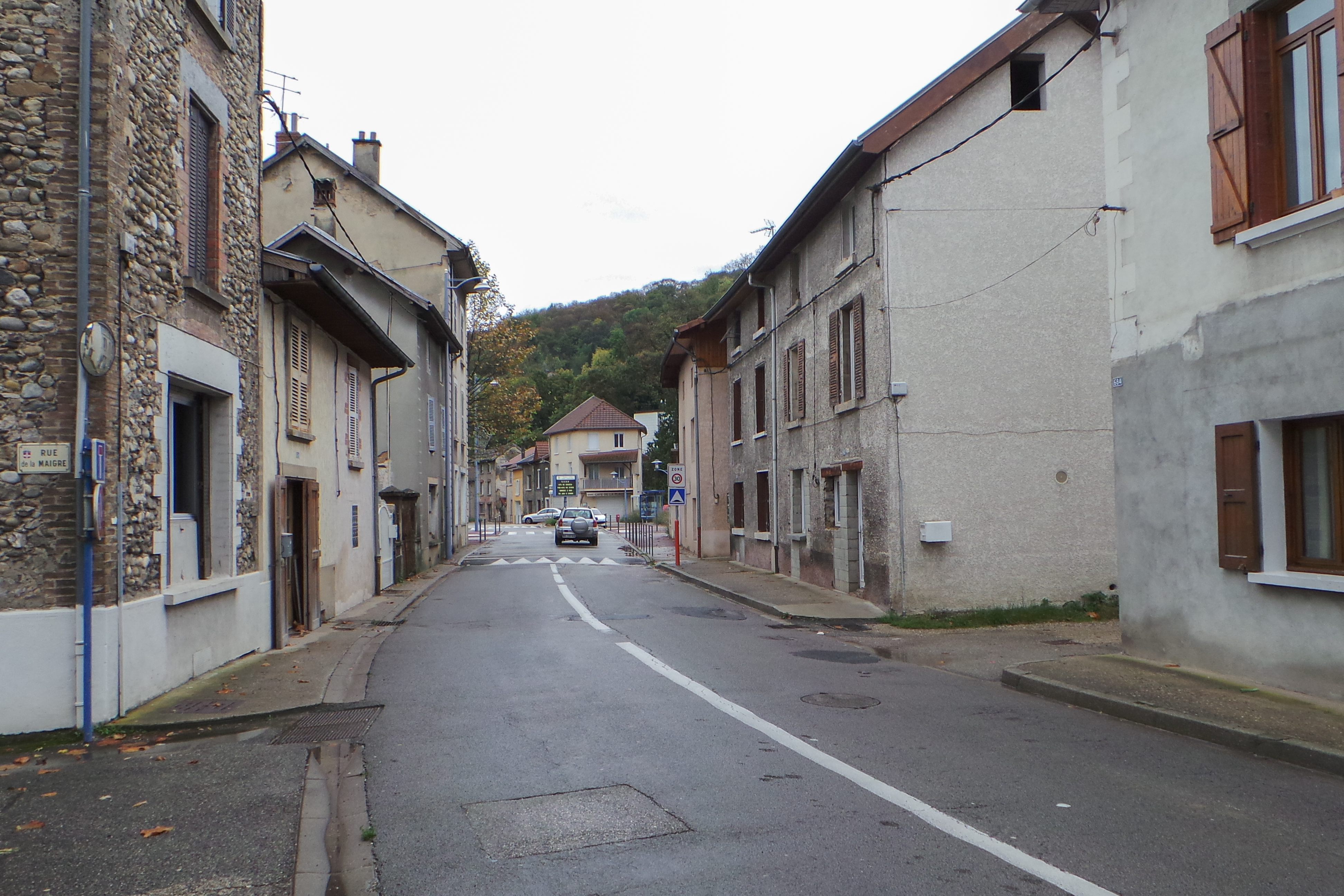 Rue de la République / Renage, Isère, France